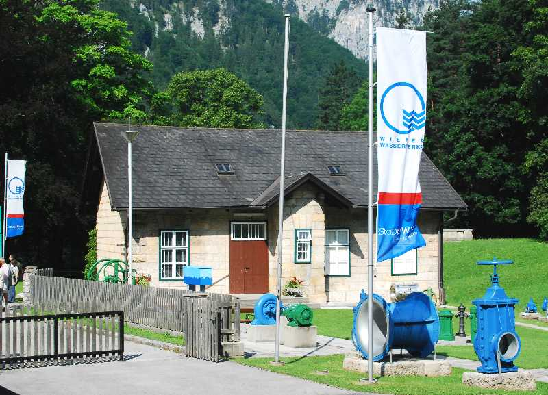 Das Wasserleitungsmuseum der Wiener Wasserwerke in Kaiserbrunn (Niederösterreich)